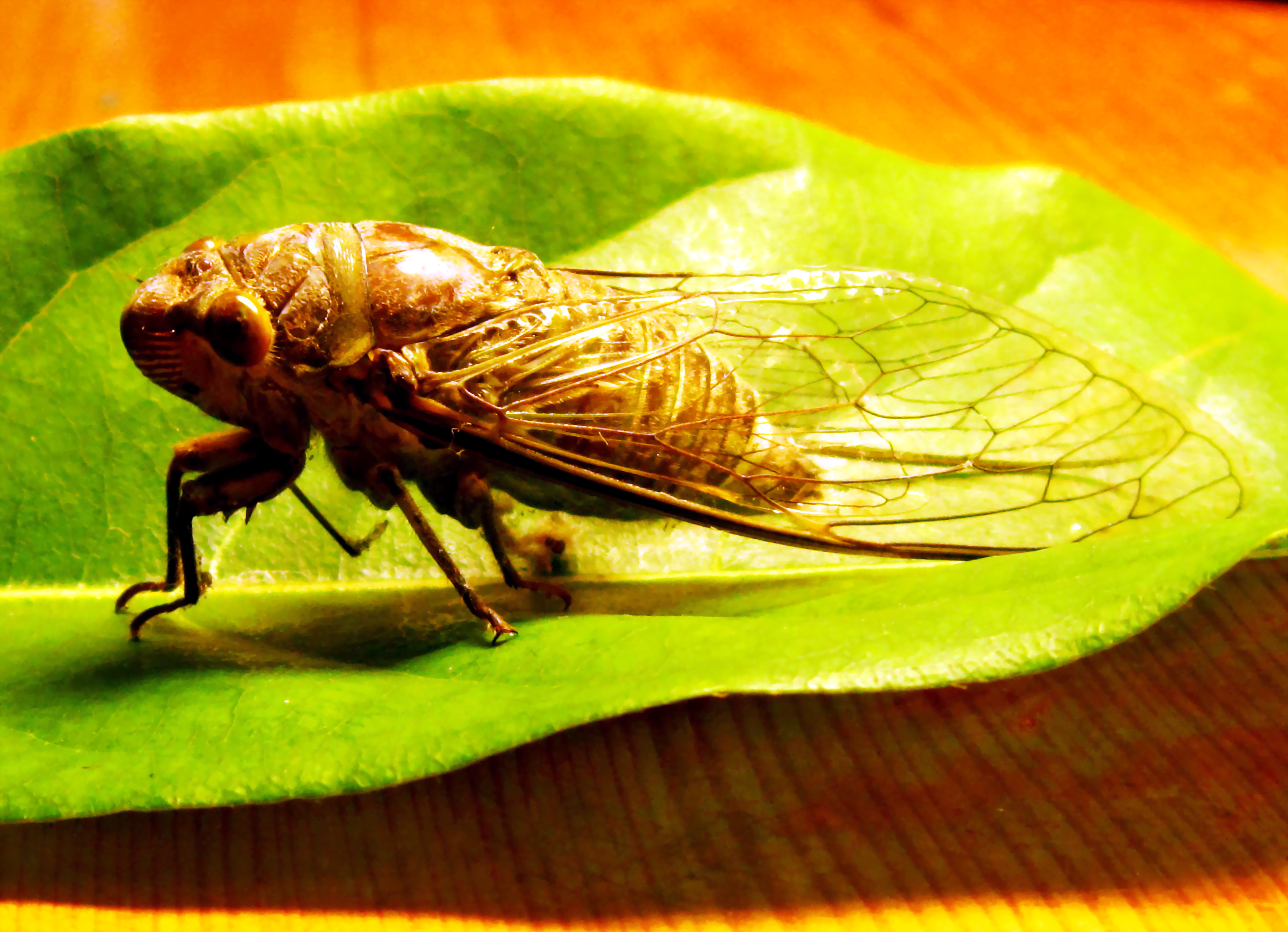 Một con ve sầu ở khu vực hồ Đại Lải, thuộc tỉnh Vĩnh Phúc, Việt Nam.